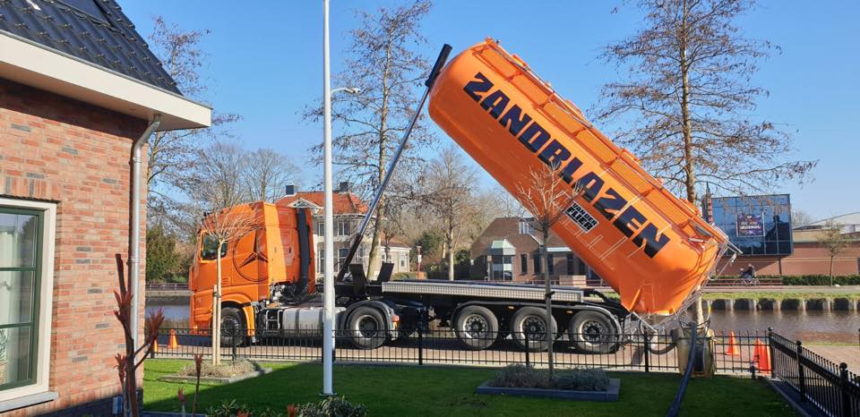 Zandblazen